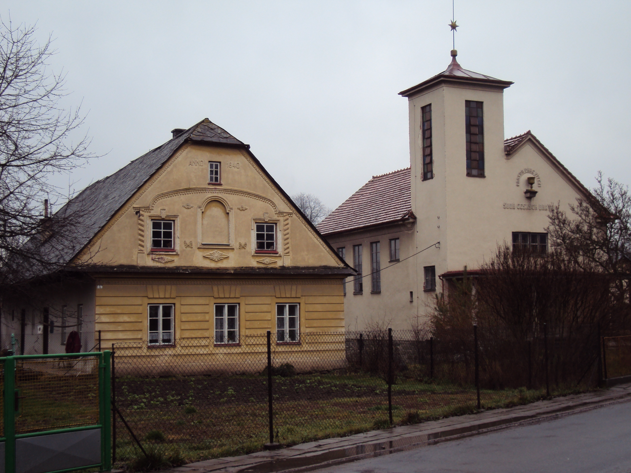 Sudkov kostel + stavení